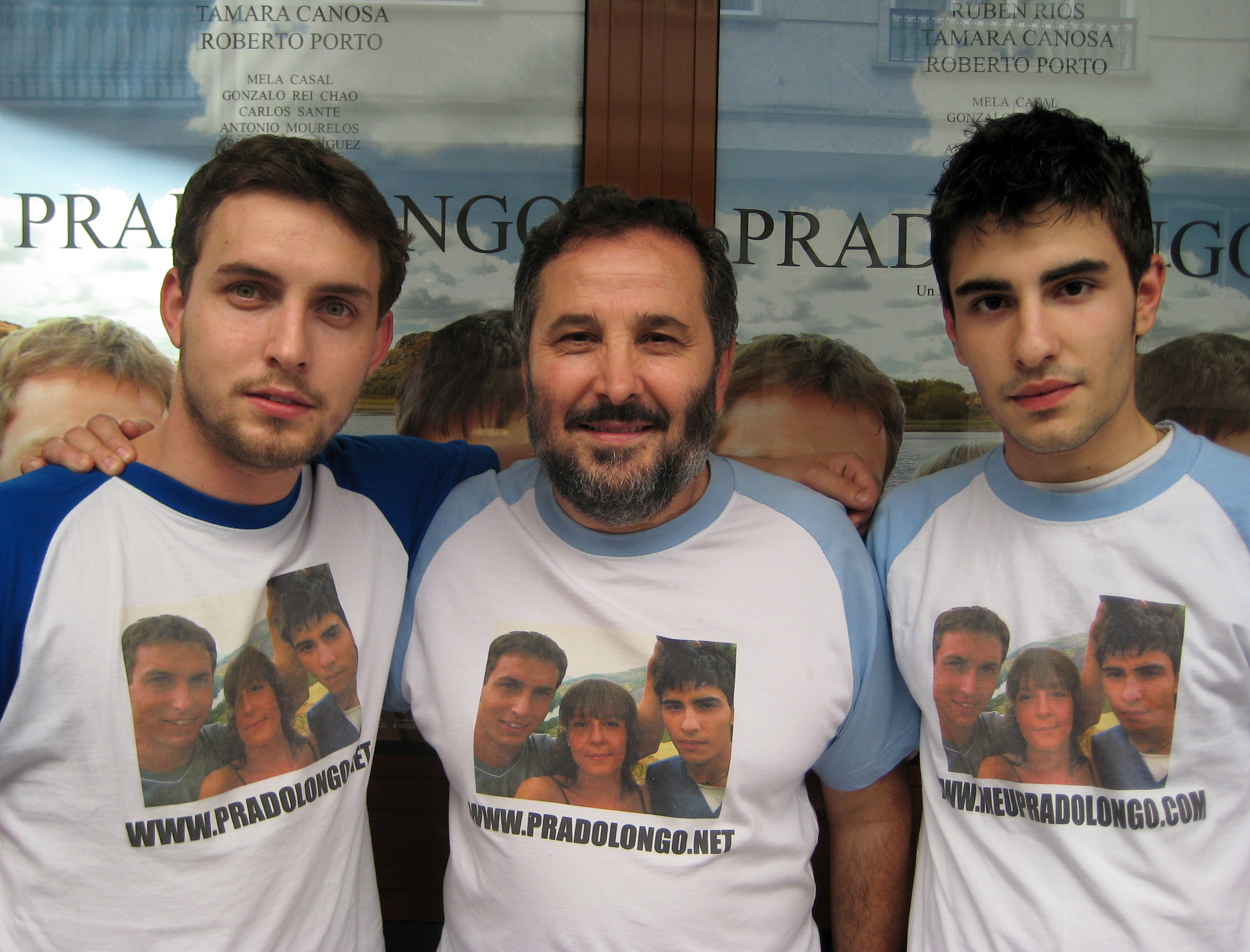 Rubén Riós, Ignacio Vilar e Roberto Porto presentando a película Pradolongo na Estrada. Realizada co permiso dos fotografados